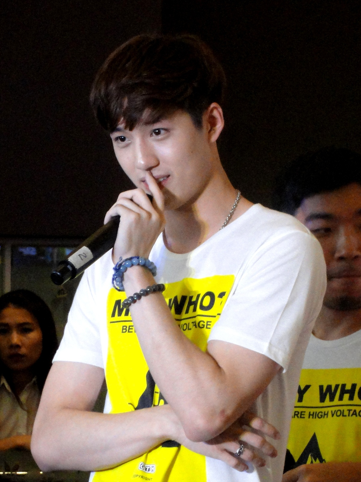 ธนภพ ลีรัตนขจร